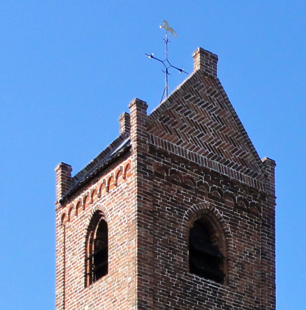 Toren met windwijzer in de vorm van een paard van de Sint-Petruskerk Jistrum